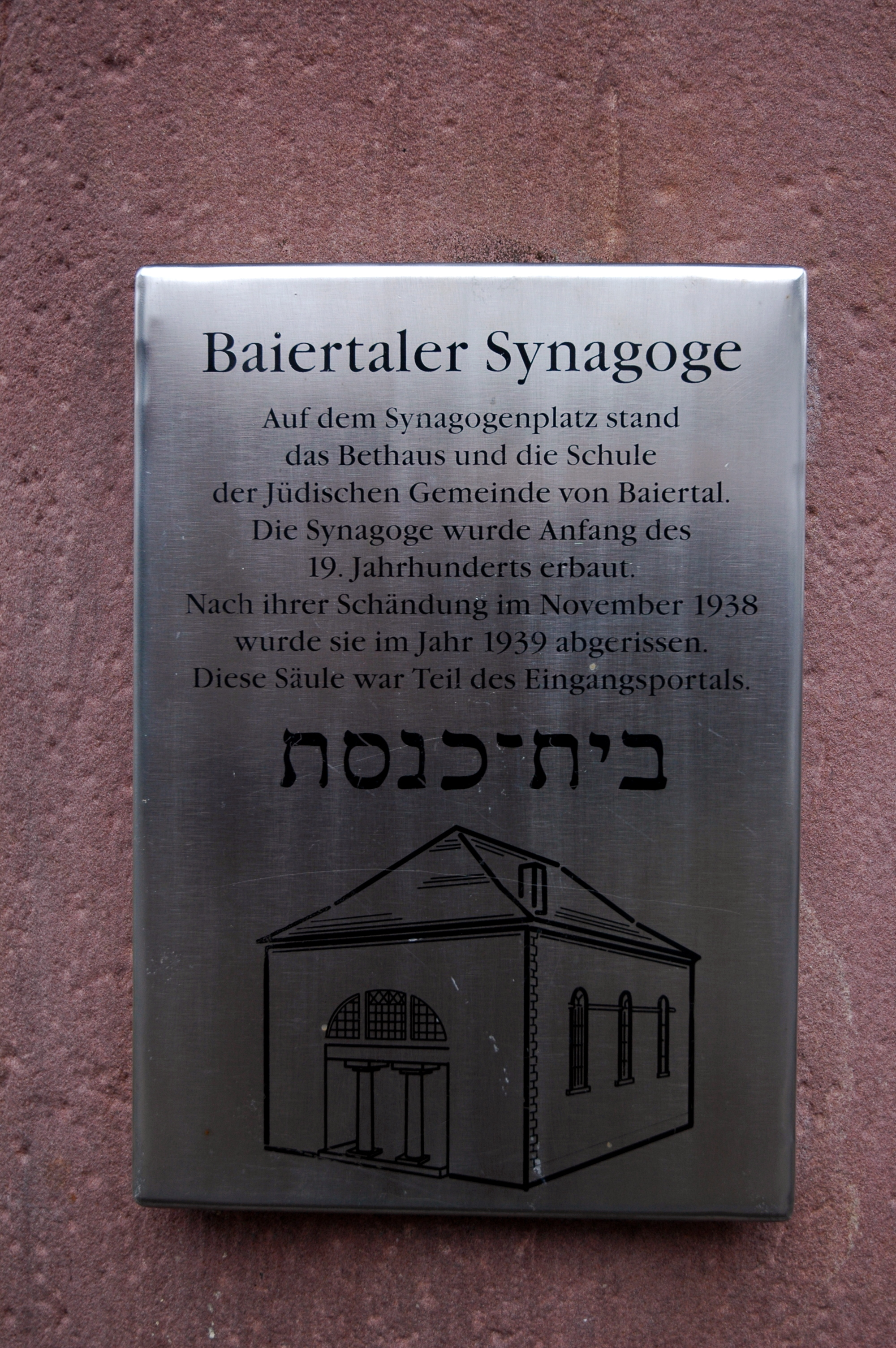 Baiertaler Synagoge